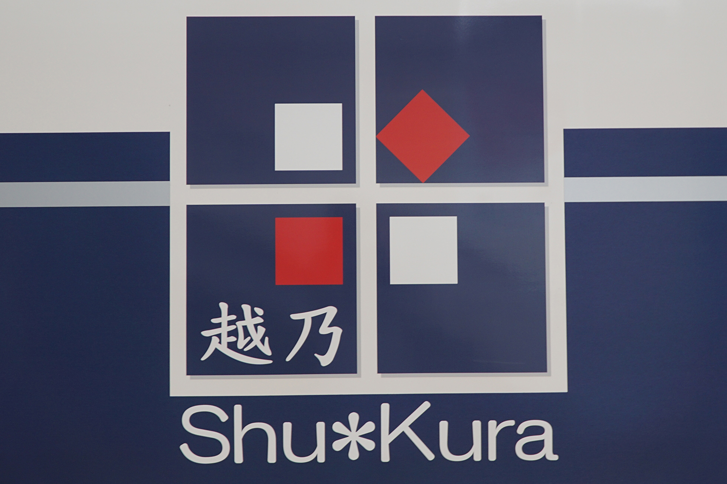 越乃Shu＊Kura ロゴ